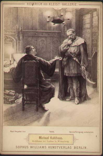 מיכאל קולהאס מבקר את מרטין לותר